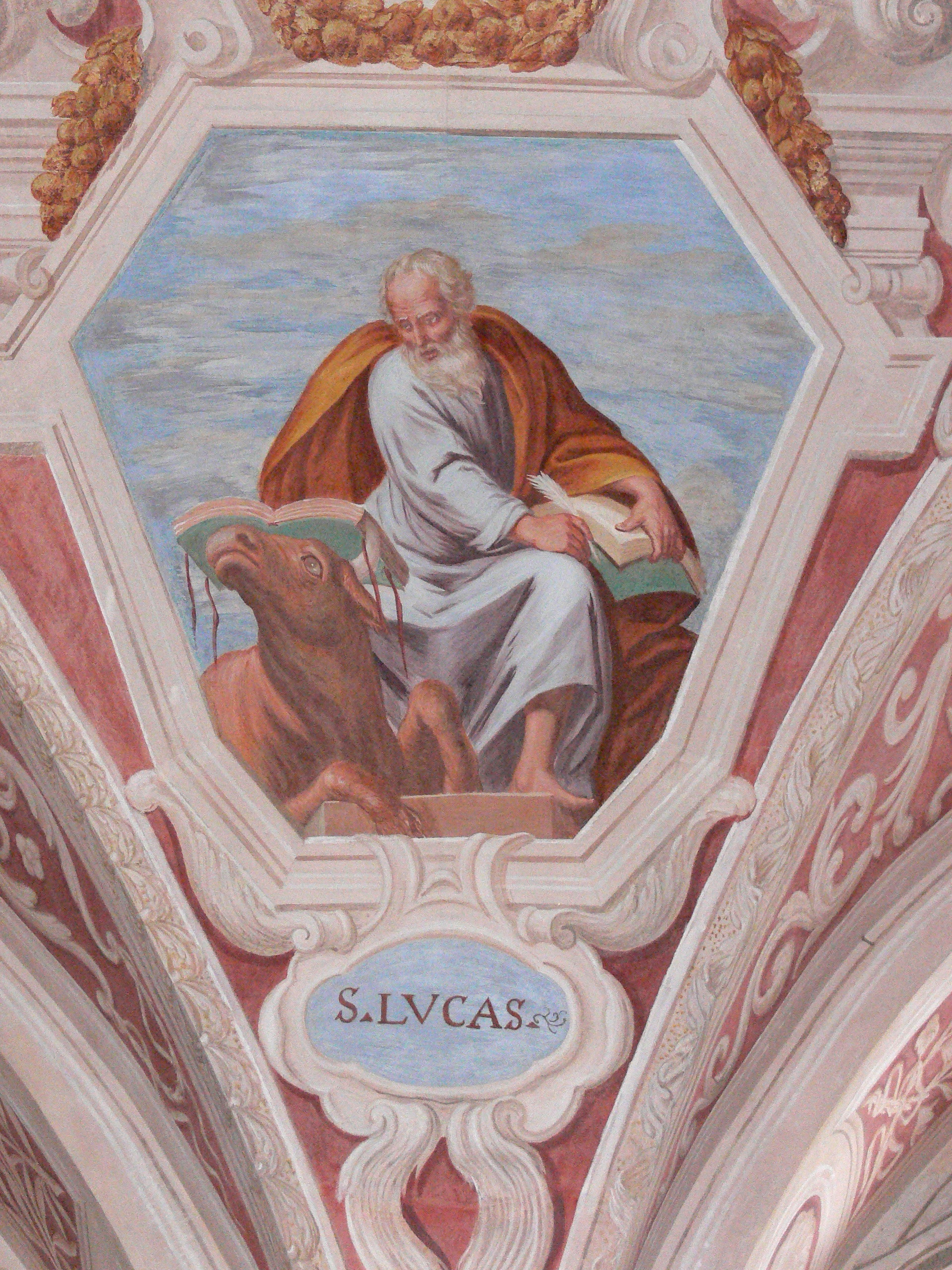 Pfarrkirchen i.M. Parish church: Fresco - Saint Luke the Evangelist.